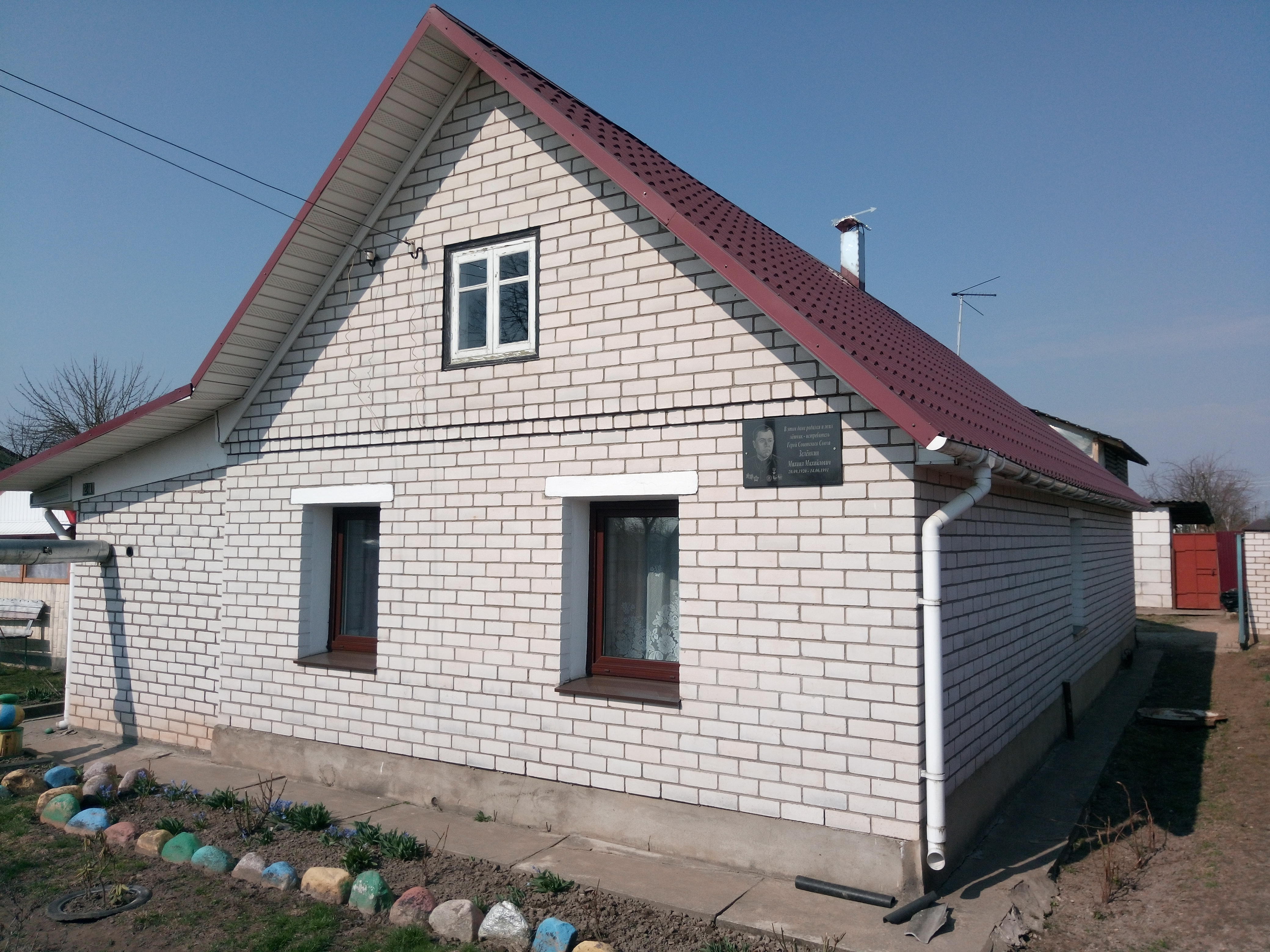 Рудзенск. Памятная таблічка на дому дзе жыў Герой Савецкага Саюза Міхала Зялёнкіна.